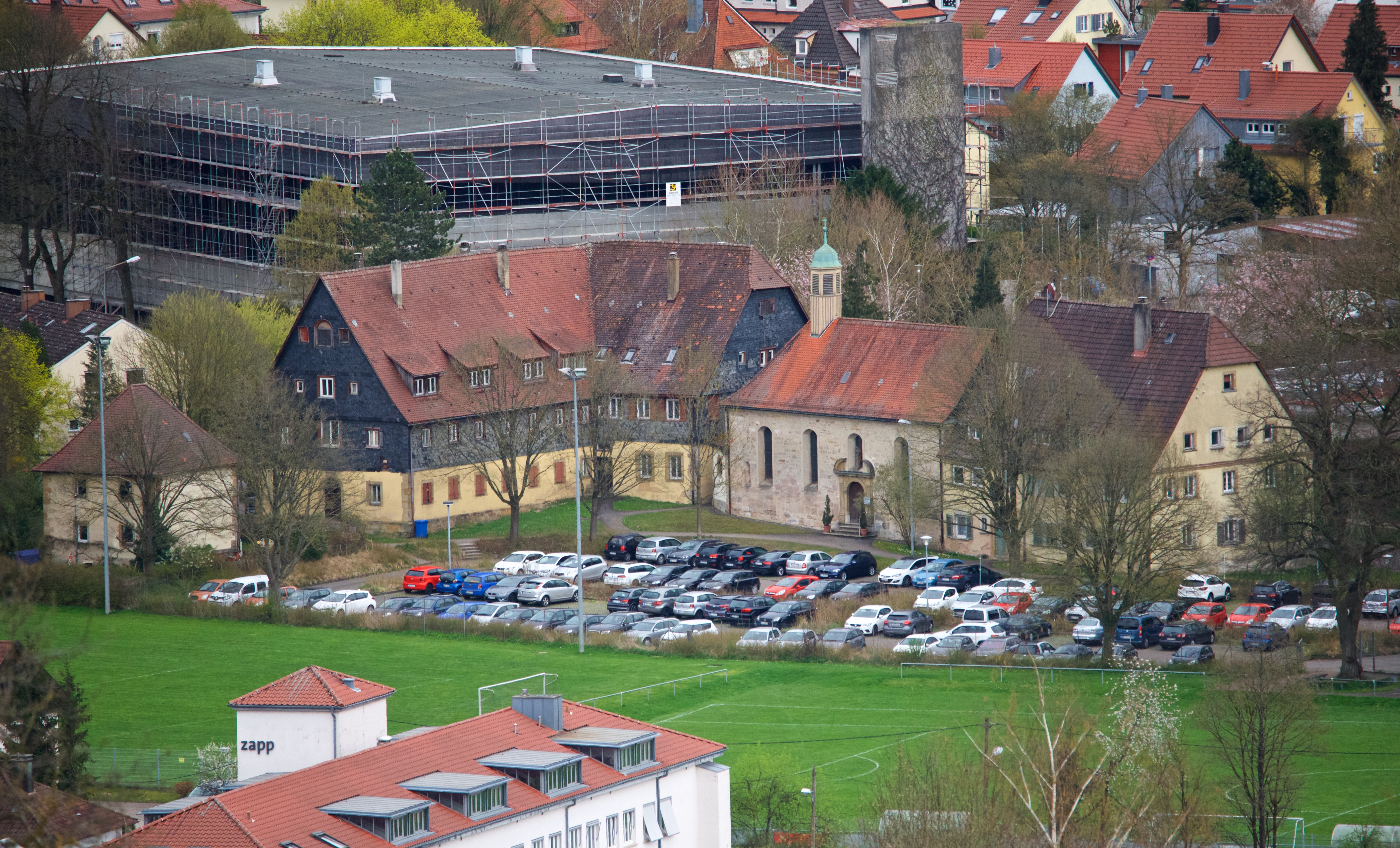 St. Katharina in Schwäbisch Gmünd, von Norden gesehen